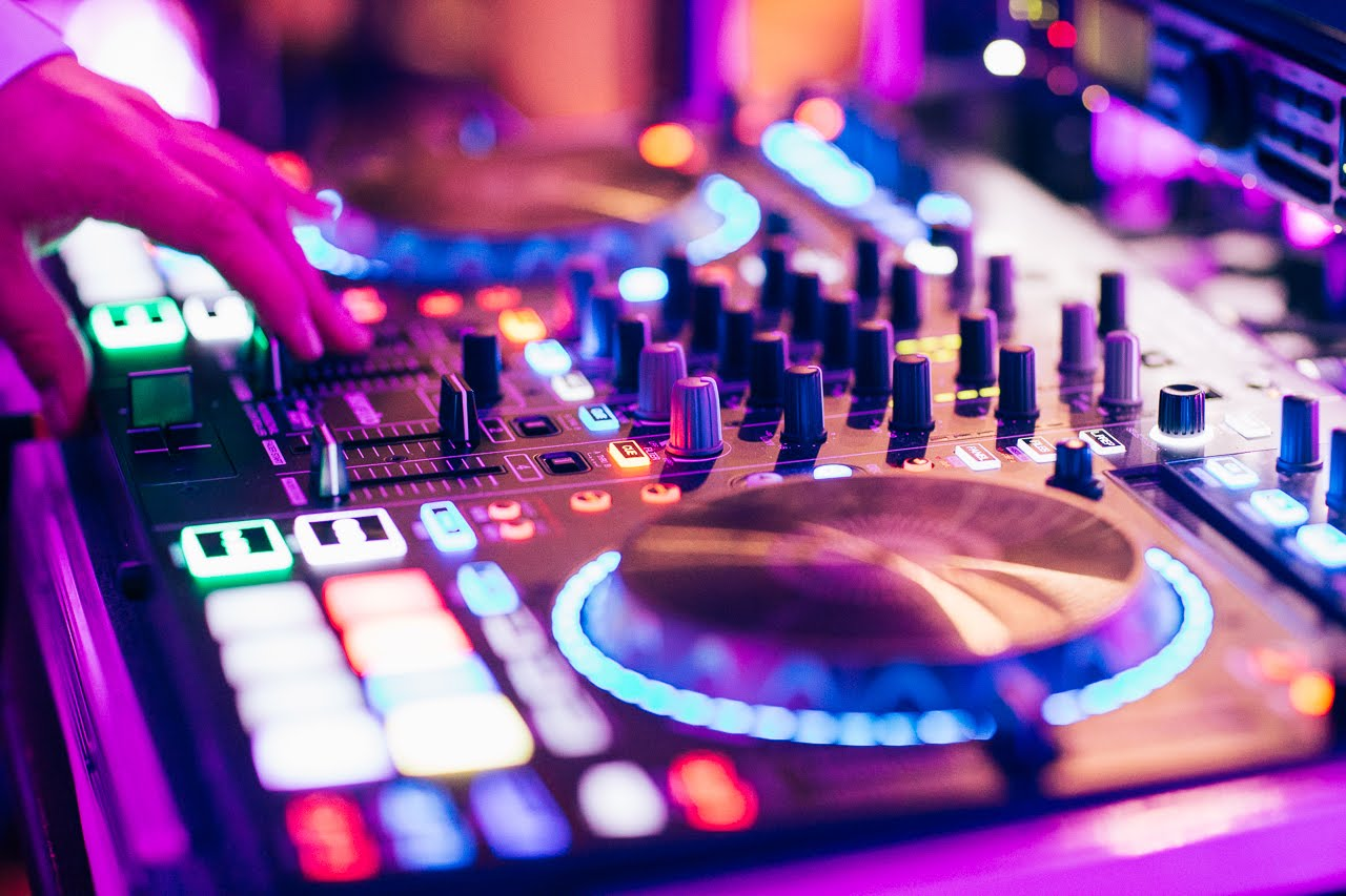 Esküvő dj keverőpult